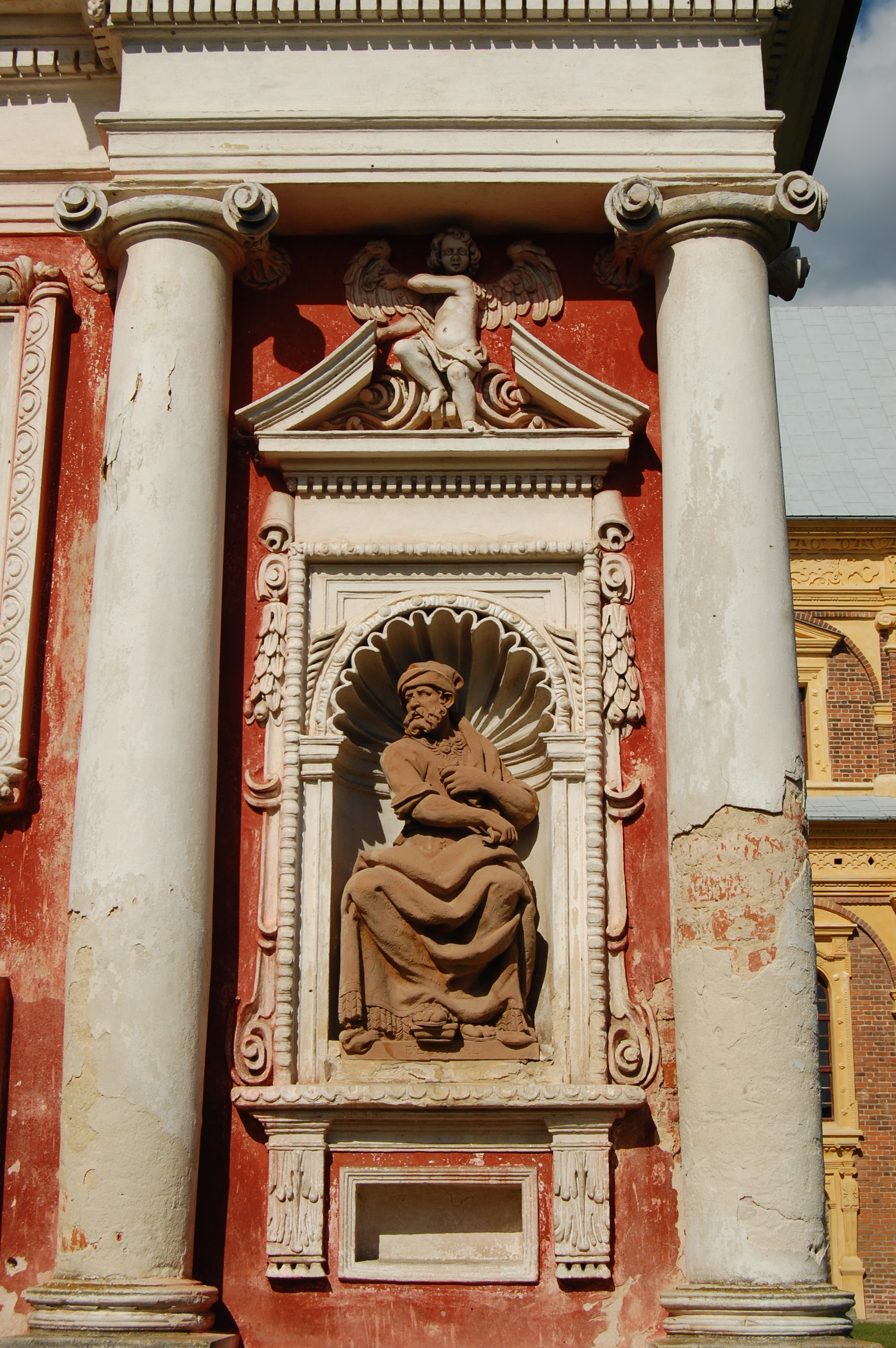 Zdobienia domku loretańskiego we wsi Gołąb w woj. lubelskim.